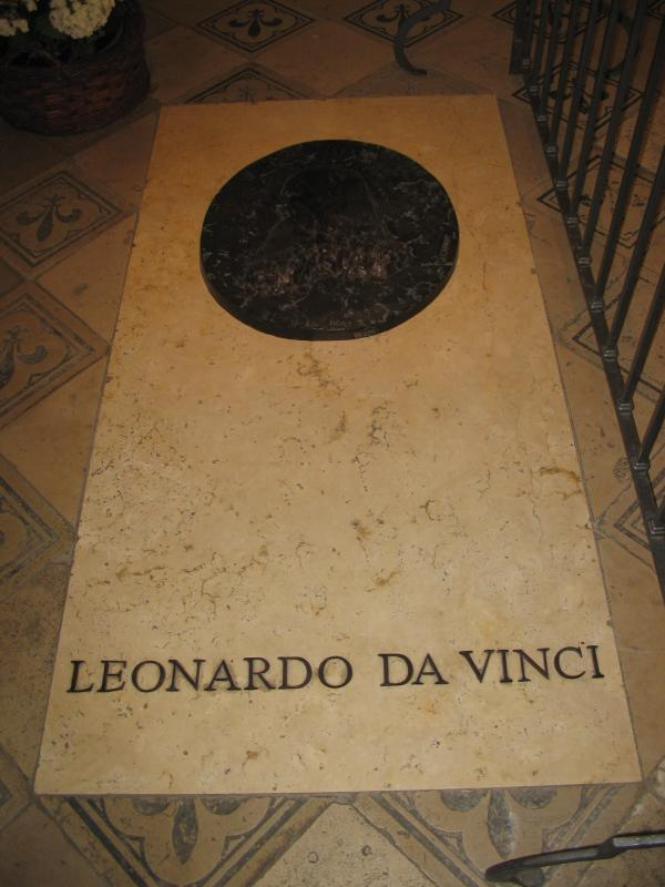 Leonardo da Vinci's Tomb in Saint-Hubert Chapel (Amboise)